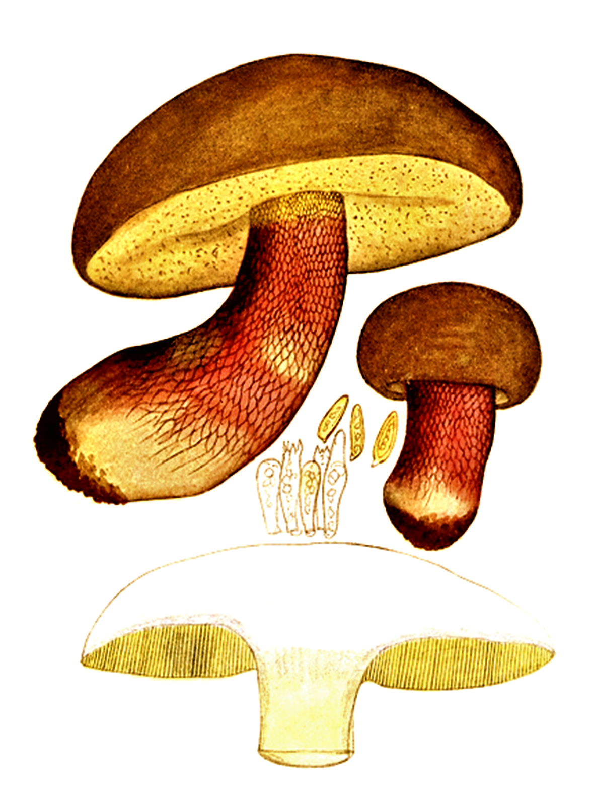 Giacomo Bresadola: Boletus olivaceus ((Schaeff.), 1774, heute Boletus calopus (Schaeff.) Pers. (1801) bzw. Caloboletus calopus (Pers.) Vizzini (2014)